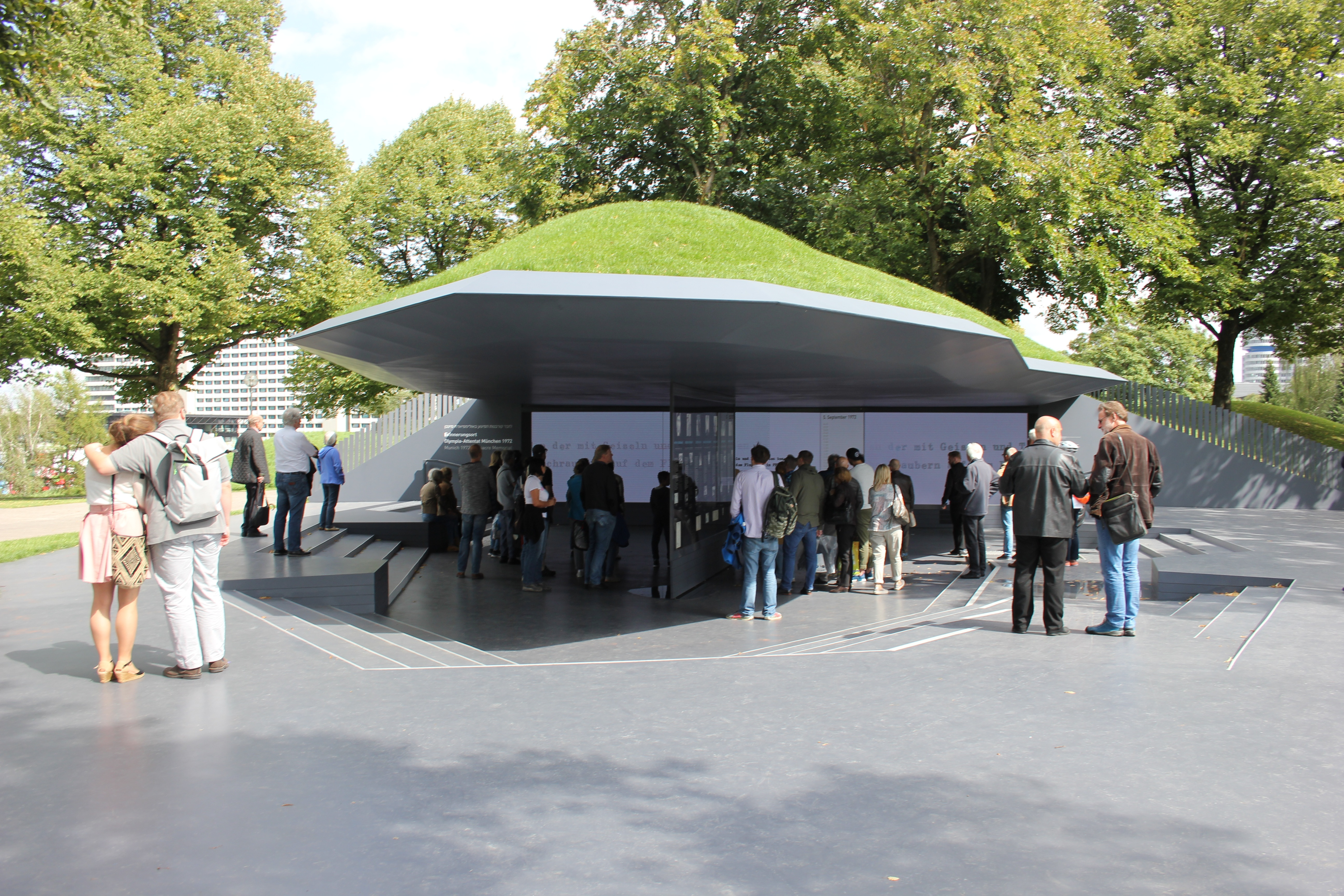 Erinnerungsort im Olympiapark München